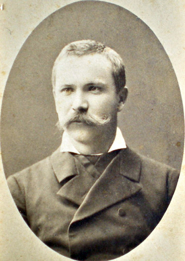 Іван Карпенко-Карий: Тобілевич І.К. Єлисаветград, 70-80-ті роки ХХ ст.